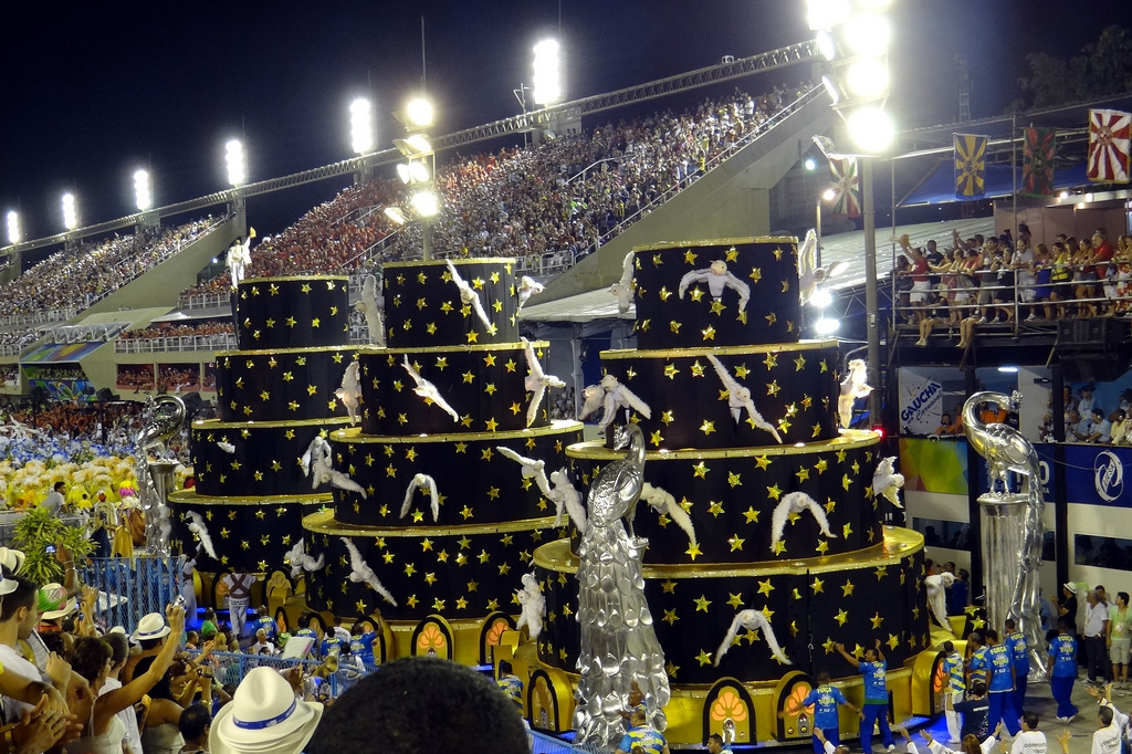 Desfile das escolas de samba do Rio de Janeiro no Sambódromo Grupo Especial Ano 2012 Escola Unidos da Tijuca Foto Regina Santelli